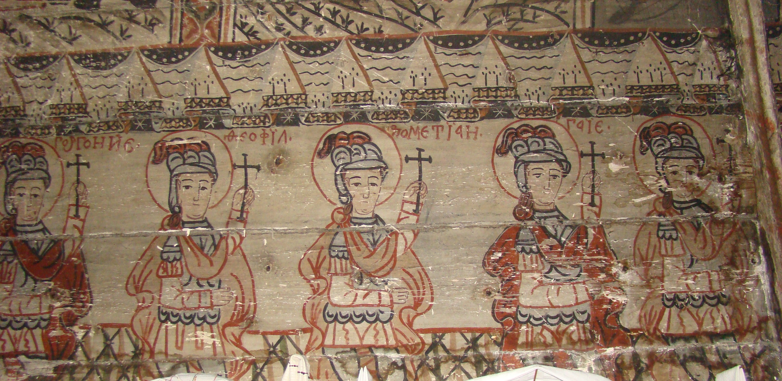 Dângău Mic, județul Cluj